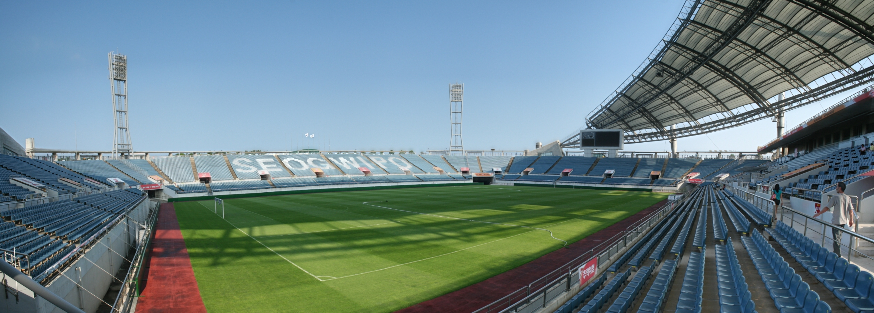 Jeju World Cup Stadium, Jeju Island